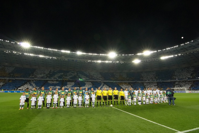 Вболівальники «Динамо» (Київ) перед останнім матчем в кваліфікації Ліги чемпіонів проти «Борусії» (Менхенгладбах).